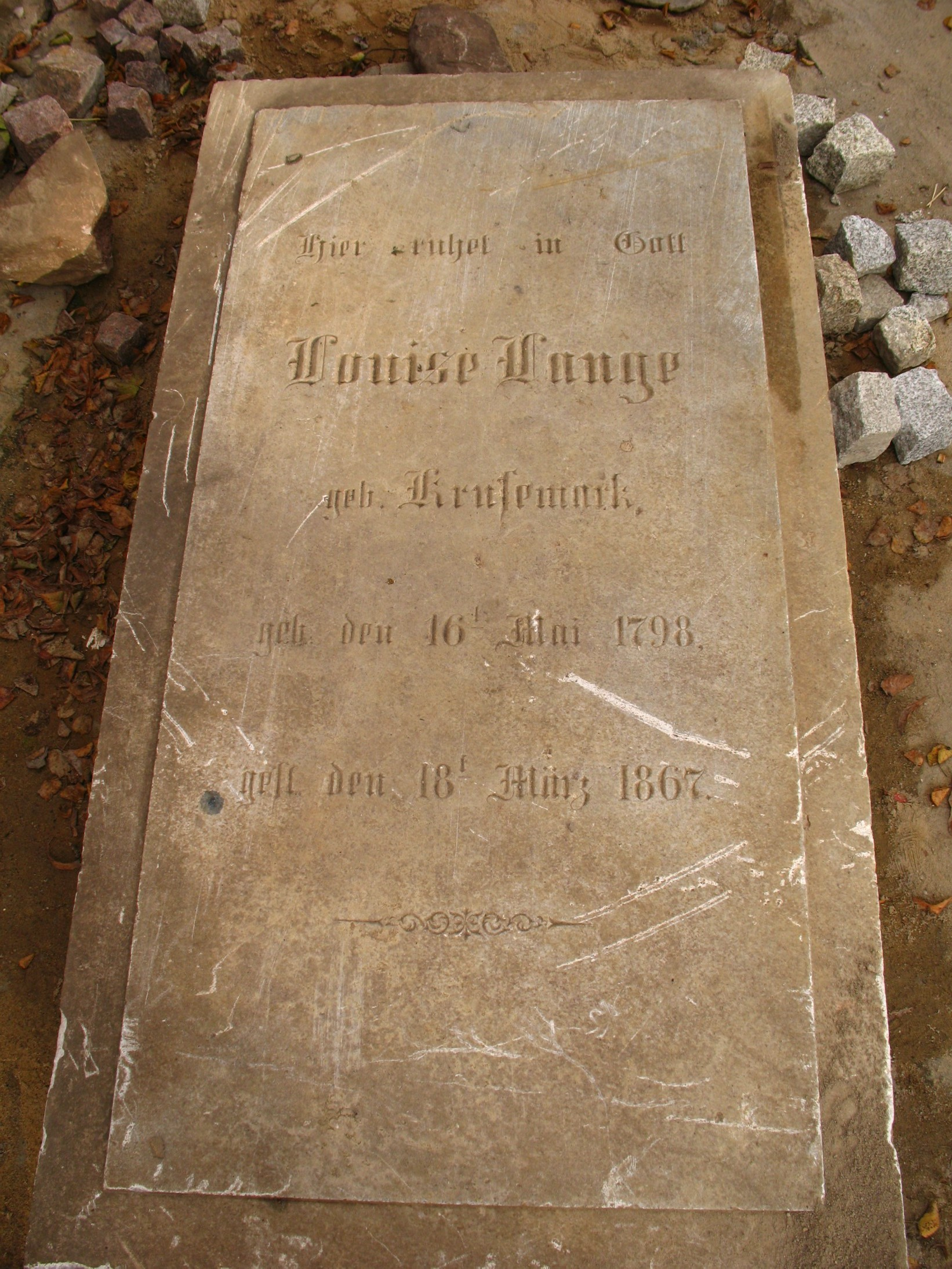 Niemieckojęzyczne epitafium odkryte przypadkowo podczas prac budowlanych przy kościele w Kozielicach we wrześniu 2007 roku.